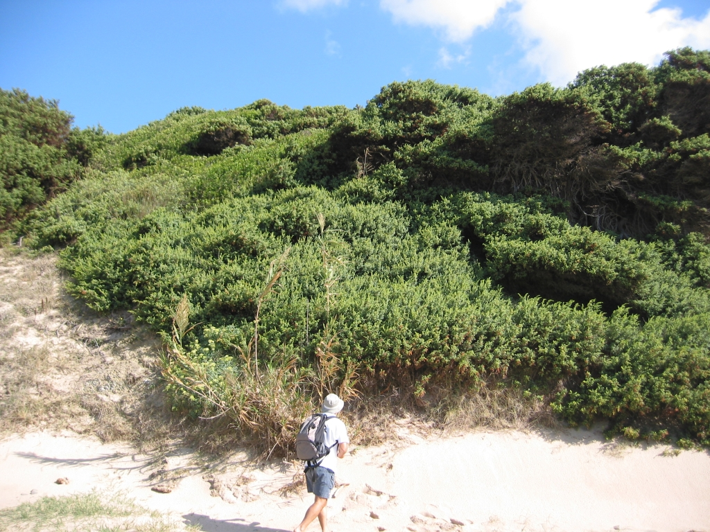 Juniperus macrocarpa habitat. Playa de Valdevaqueros, Punta Paloma, Tarifa 36°04'N 5°42'W